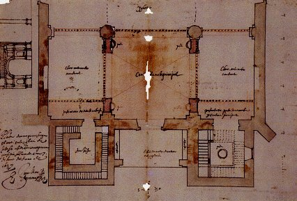 Trazas del pórtico y el coro de la Catedral de Getafe (Comunidad de Madrid, España).